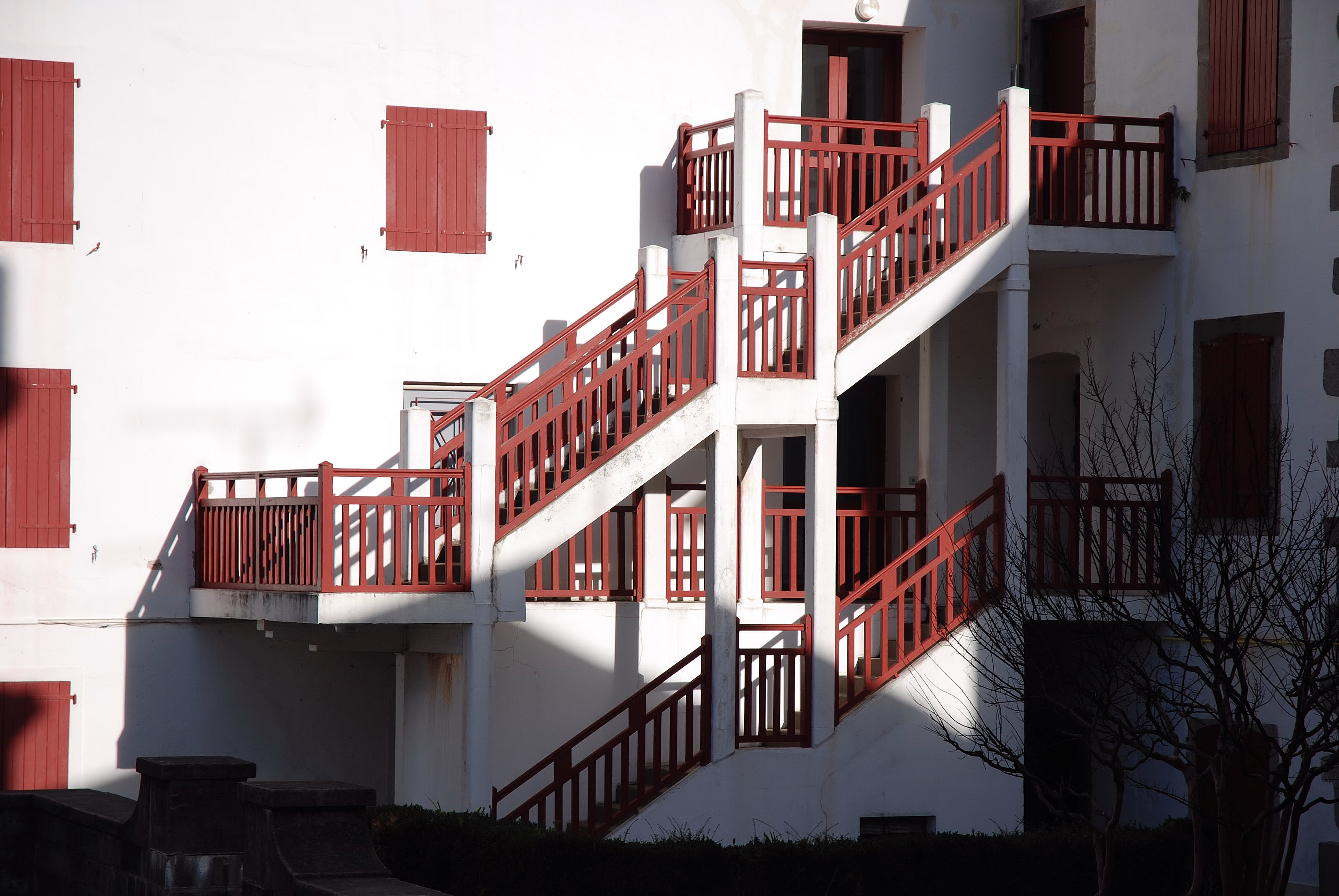 Escalier extérieur à volées droites aux couleurs basques, Hasparren, Pyrenées-Atlantiques, Aquitaine, France. Photo prise le 31/12/06 par Harrieta171